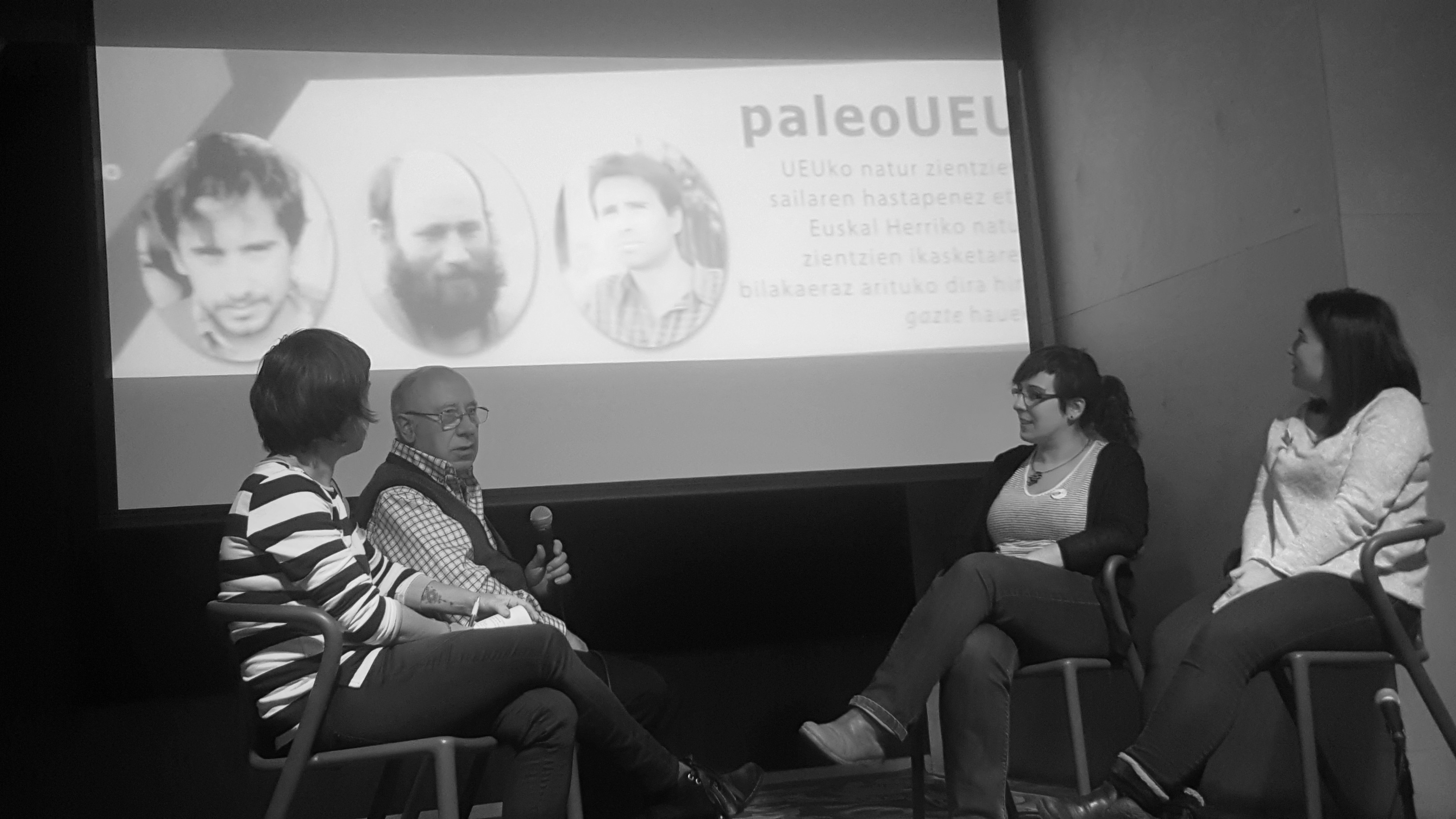 Jesus Mari Txurruka, #Txiotesia4 lehiaketako ekitaldian 2018an UEUren historiaz.